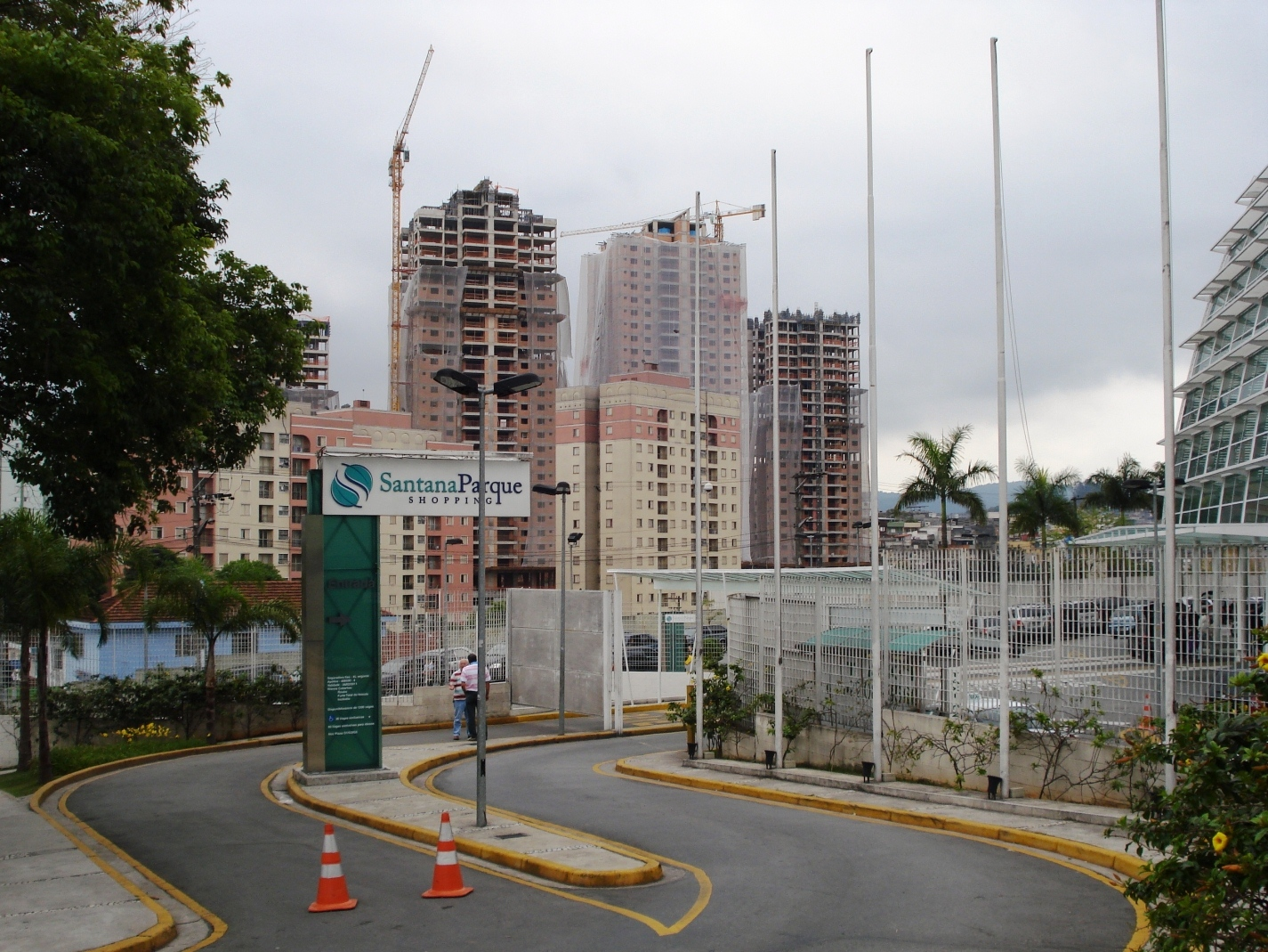 Lauzane Paulista, zona norte de São Paulo, SP, Brasil.